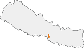 Położenie Rezerwatu Przyrody Parsa (Parsa Wildlife Reserve)